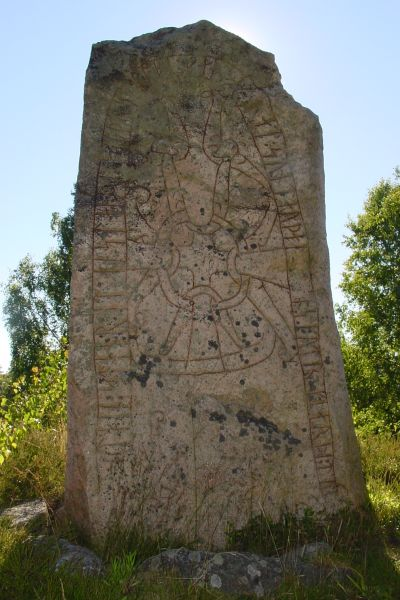 Runsten, Sö122 Skresta, strax utanför Nyköping i Södermanland. Bilden är tagen av Användare:Jvki 4 juli 2005. 5 juli 2005 kl.00.15 Jvki 400x600 (56710 bytes) (Runsten, Sö122 Skresta , strax utanför Nyköping i Södermanland . Bilden är tagen av Användare:Jvki 4 juli 2005. cc-by-sa-2.5 )